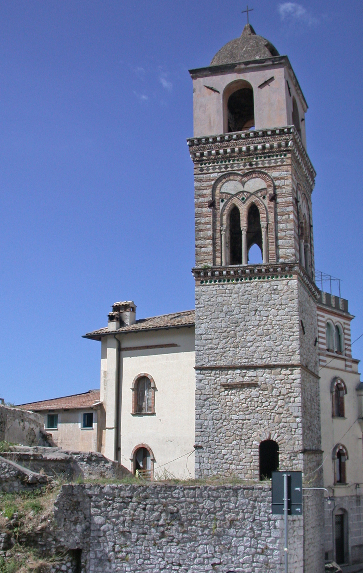 Itri, provincia di Latina, regione Lazio, Italia. Città alta, campanile della scomparsa chiesa di Santa Maria Maggiore